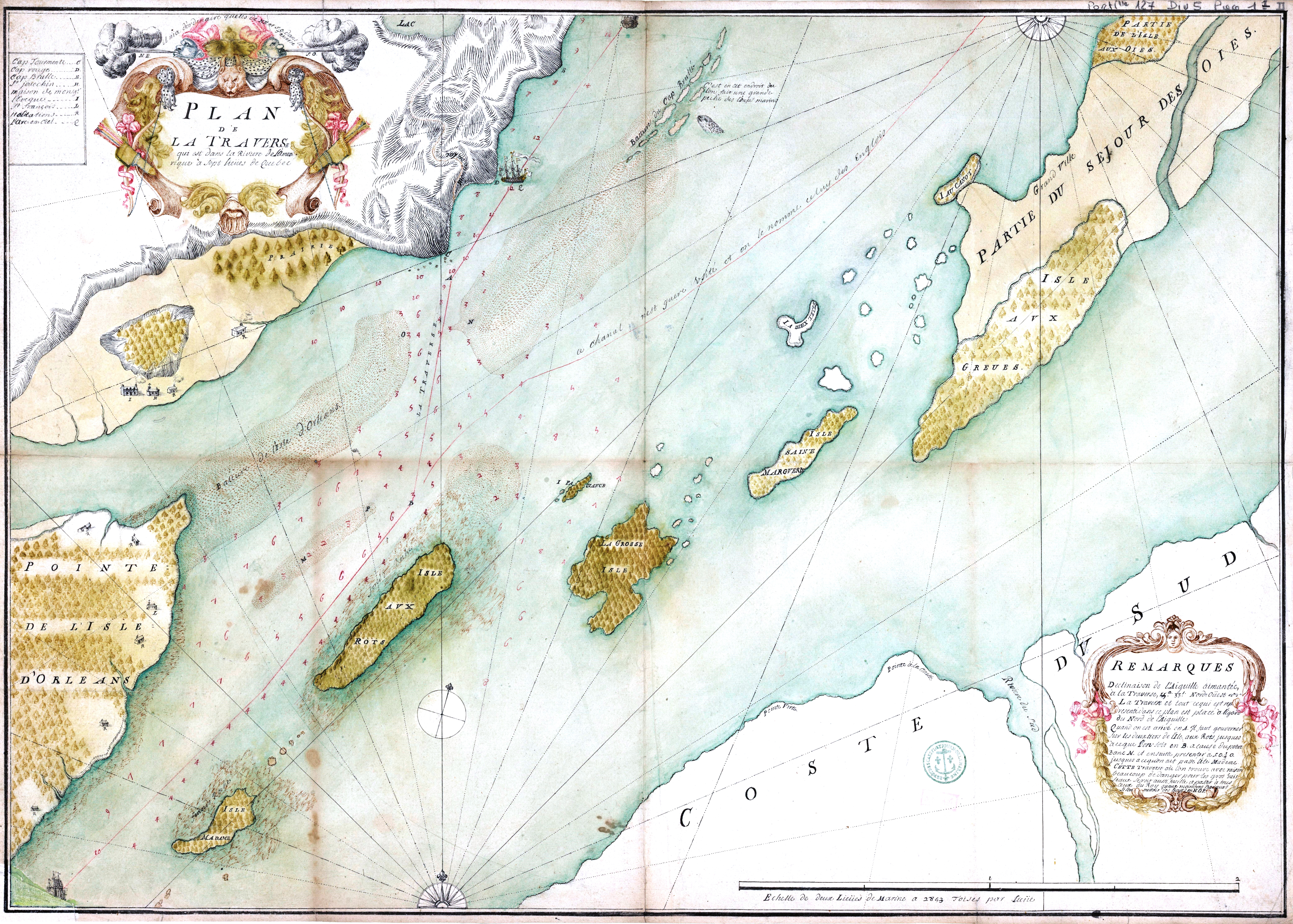 Plan de la traverse qui est dans la Riviere de l'Amerique à sept lieues de Quebec